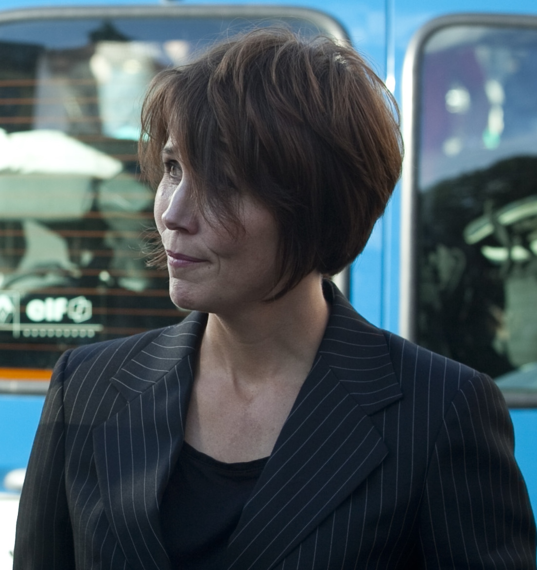 Idde Schultz under det rödgröna besöket i Eskilstuna på den Rödgröna dagen 23 augusti 2010.